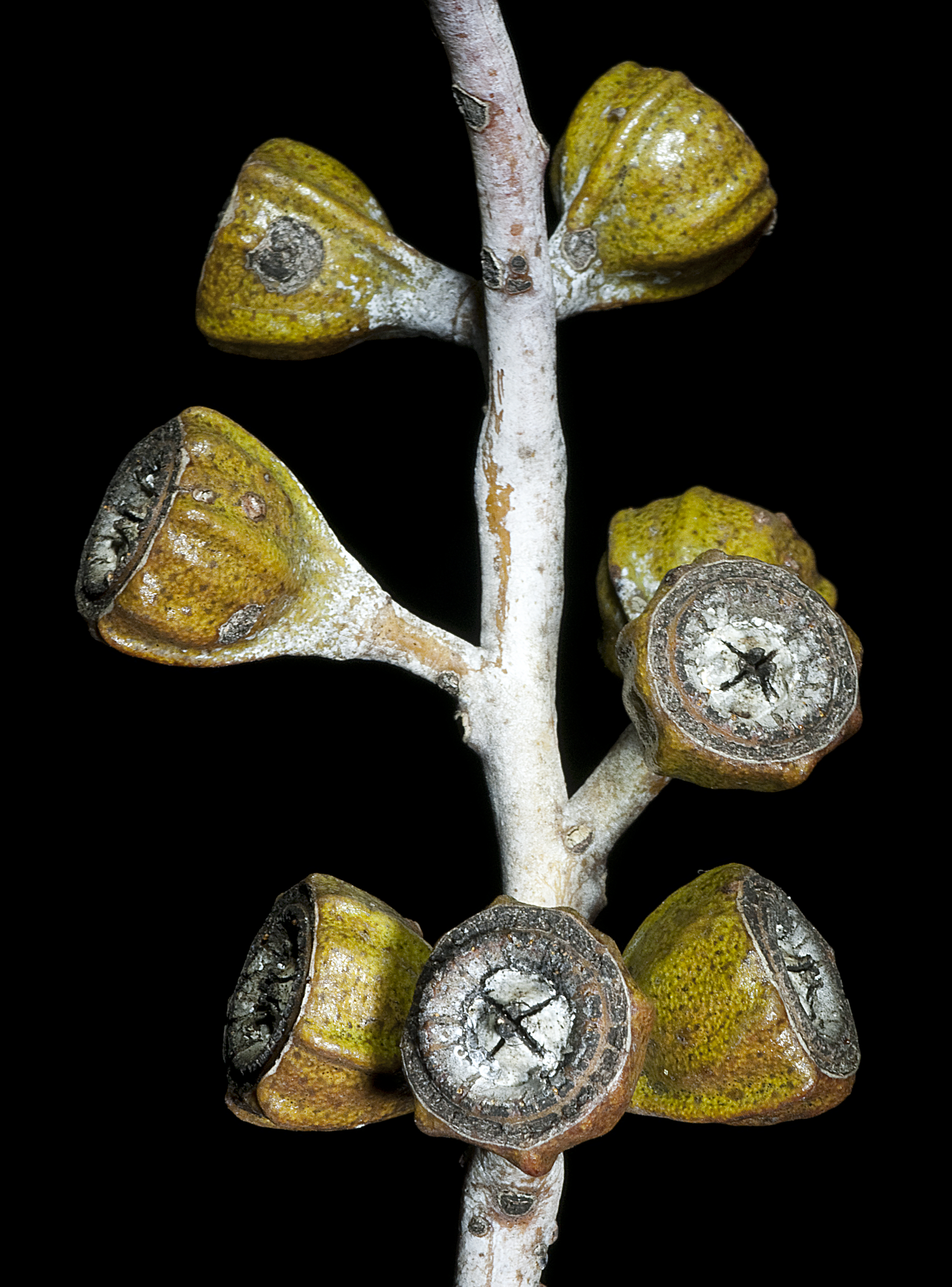 KRT4090